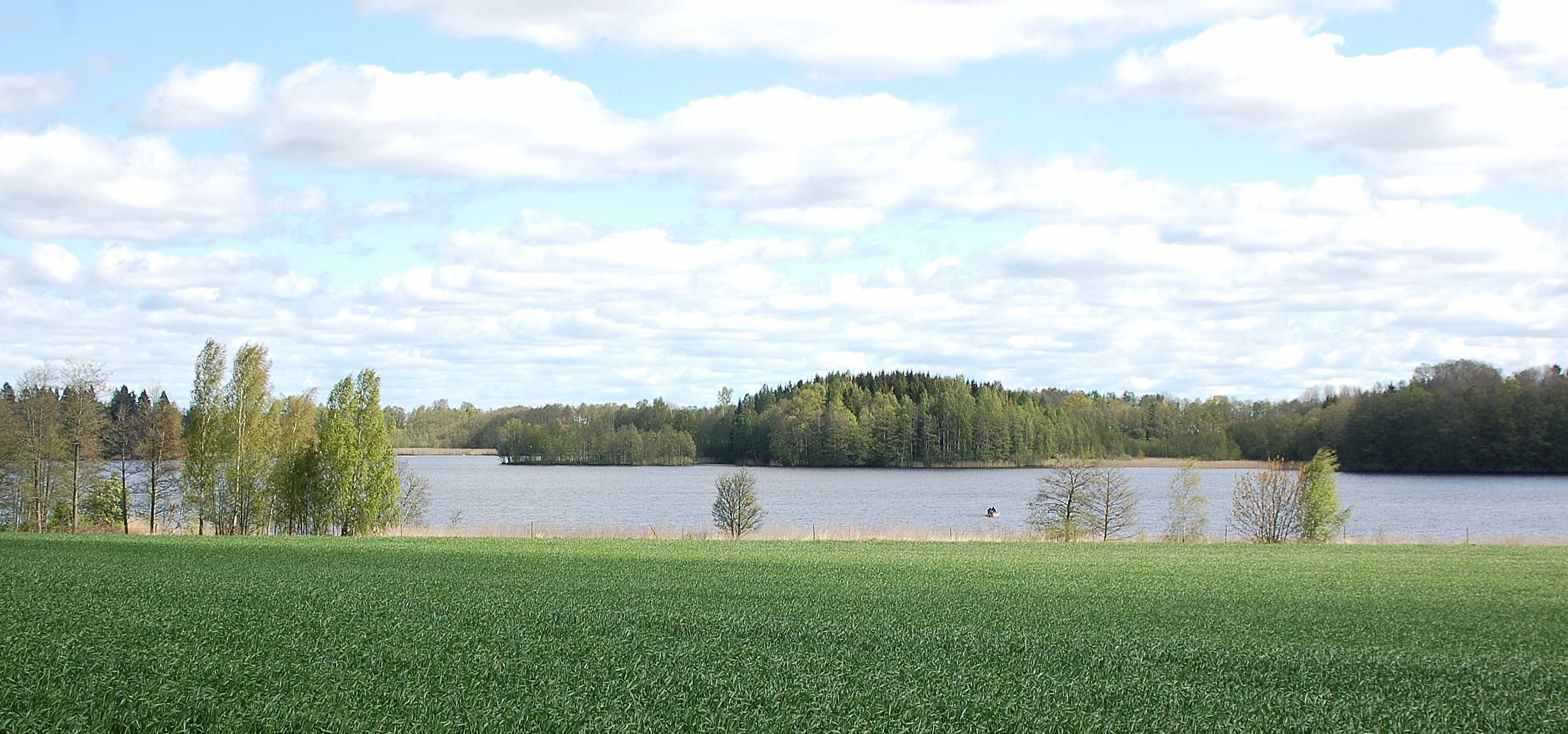 Logsjön i Lekebergs kommun, Närke.